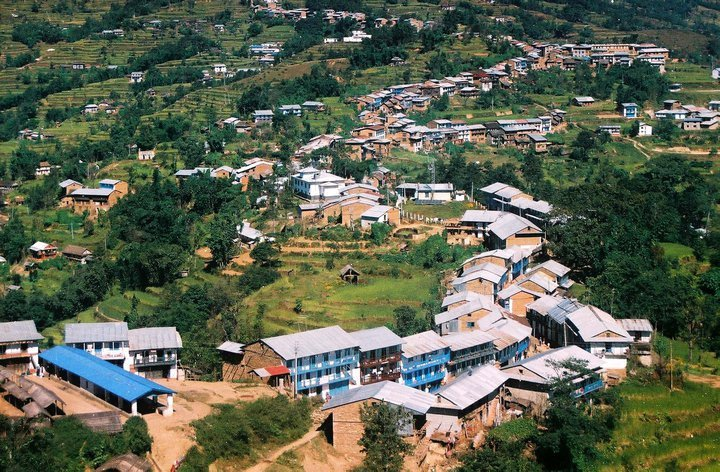 नेपाली: खोटाङ जिल्लाको सदरमुकाम ।